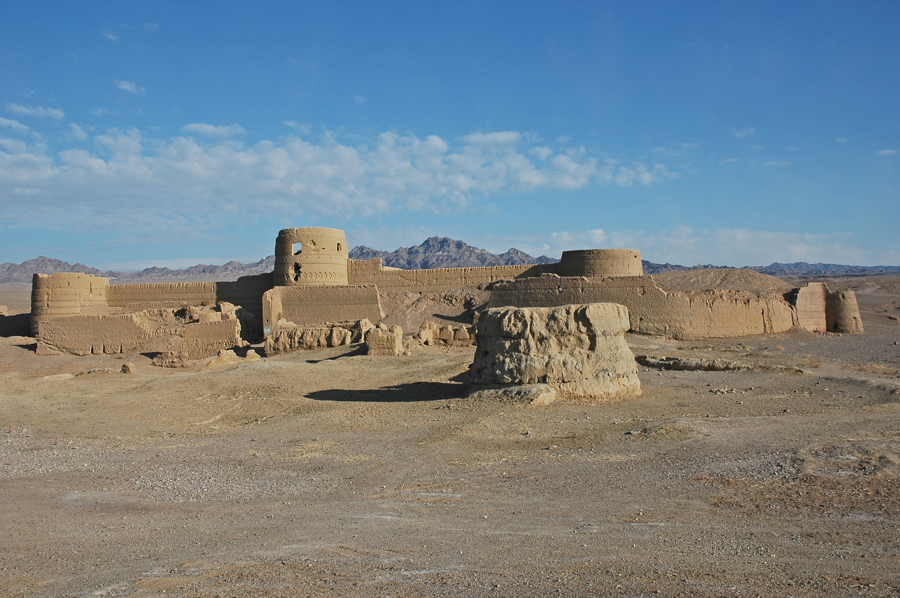 کاروان‌سرای شاه عباسی ابوزید‌آباد